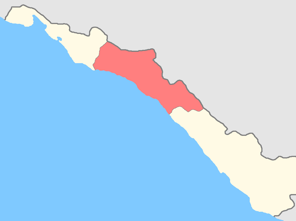 Туапсинский округ на карте Черноморской губернии